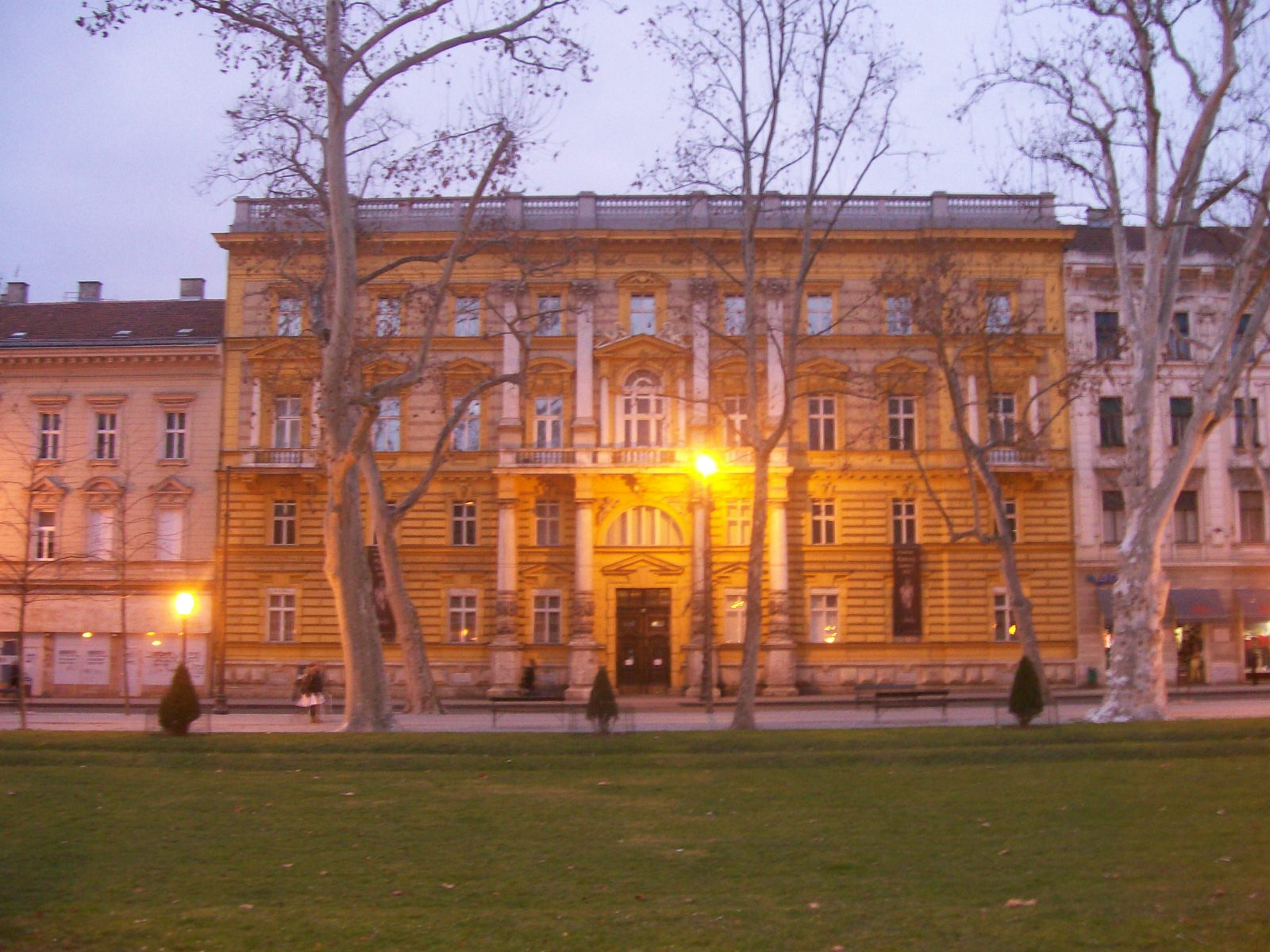 Arheološki muzej u Zagrebu